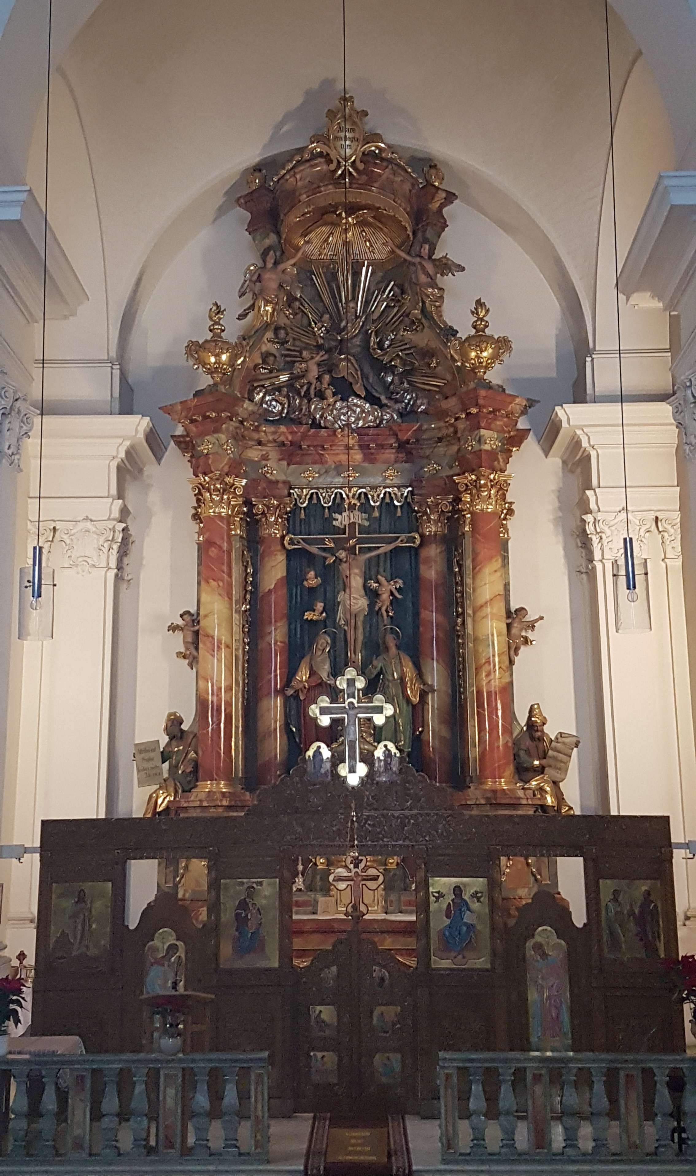 München, St. Elisabeth (Klinikviertel), rekonstruierter Rokoko-Hochaltar von 1777.